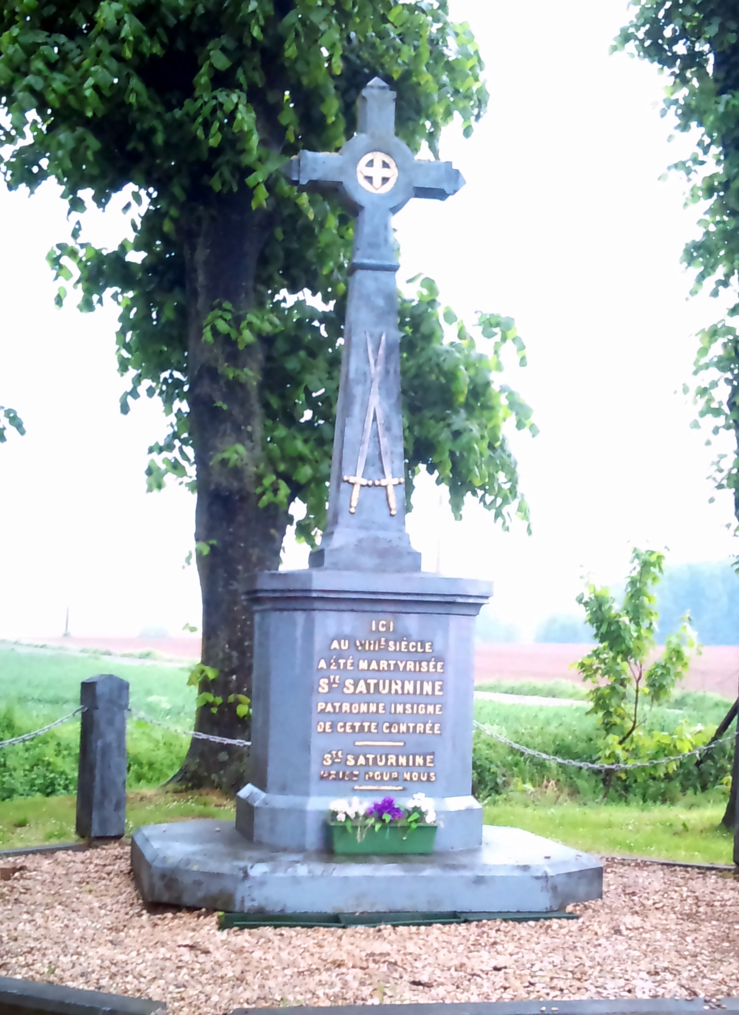 Stèle commémorative à Sainte-Saturnine situé Rue de la Croix à Sains-lès-Marquion